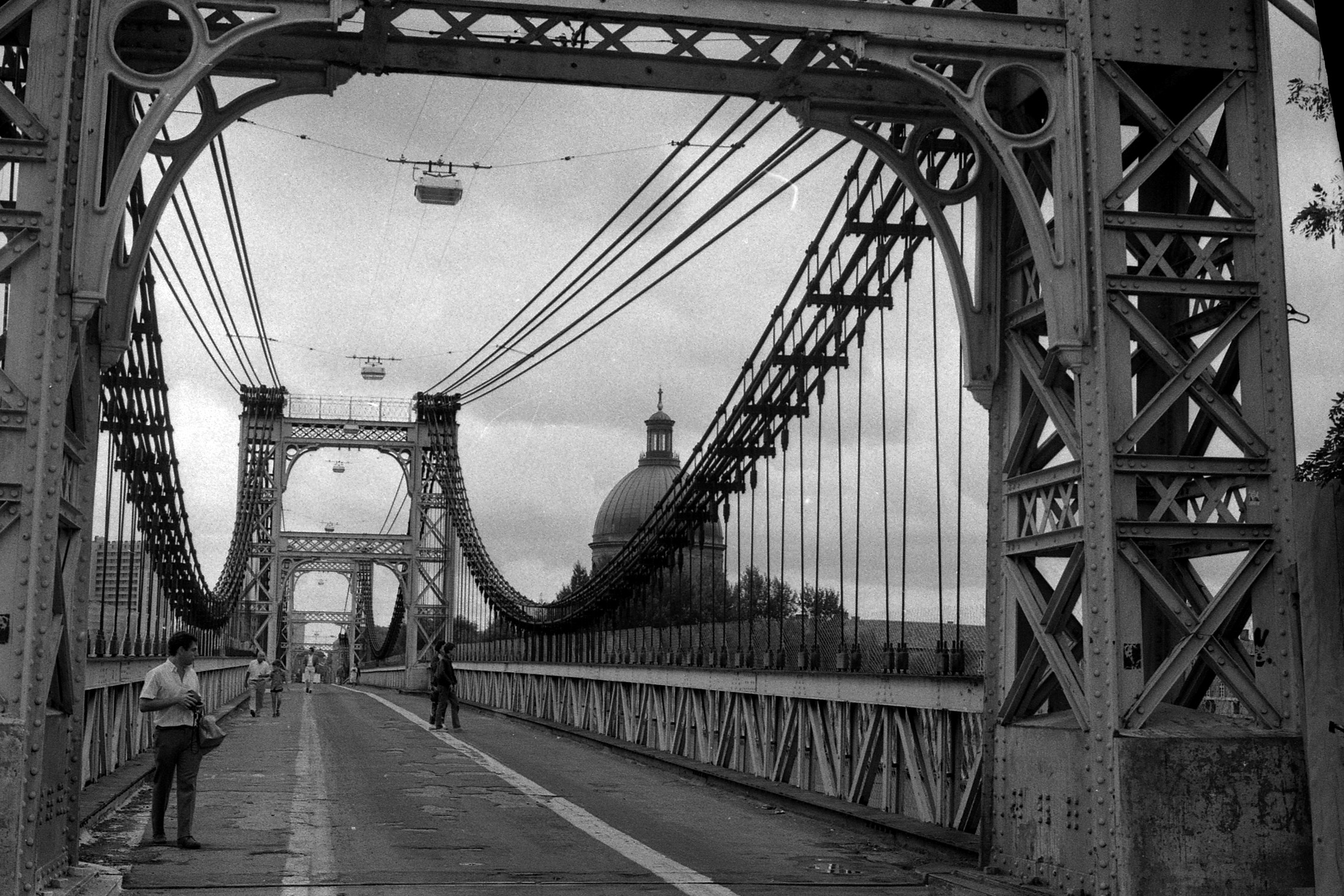 Pont suspendu et l'hôpital de La Grave. Le 24 Août 1986. Vue du pont suspendu et de l'hôpital de La Grave.